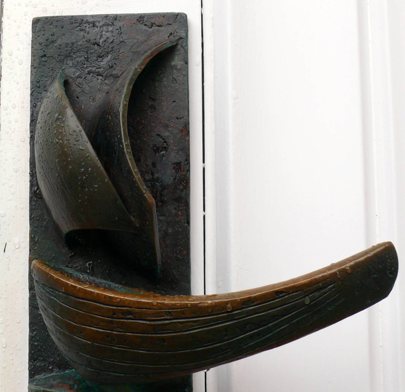 Türklinke zum Eingangsportal der Inselkirche Langeoog, hergestellt 1989 von Siegfried Zimmer